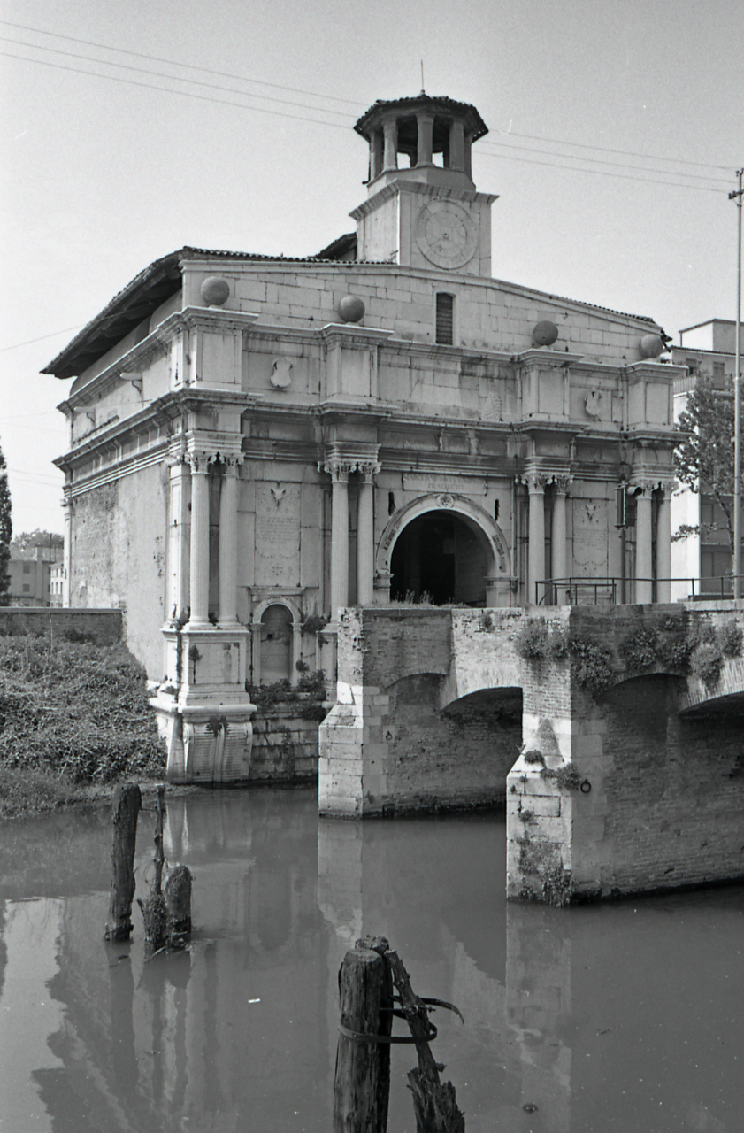 Servizio fotografico : Padova, 1967 / Paolo Monti. - Strisce: 7, Fotogrammi complessivi: 37 : Negativo b/n, gelatina bromuro d'argento/ pellicola ; 35 mm. - ((I fotogrammi hanno una doppia numerazione. . - Sul portanegativi: Leica M Adox 17. - Occasione: Pubblicazione: Diego VALERI (a cura di), Padova: i secoli, le ore, Bologna, Edizioni Alfa, 1967. - Fonte: Agenda di Paolo Monti: Monti/ 3 aprile 1966 - 9 marzo 1971/ 12421-16823 (1966-1971), presso Archivio Paolo Monti